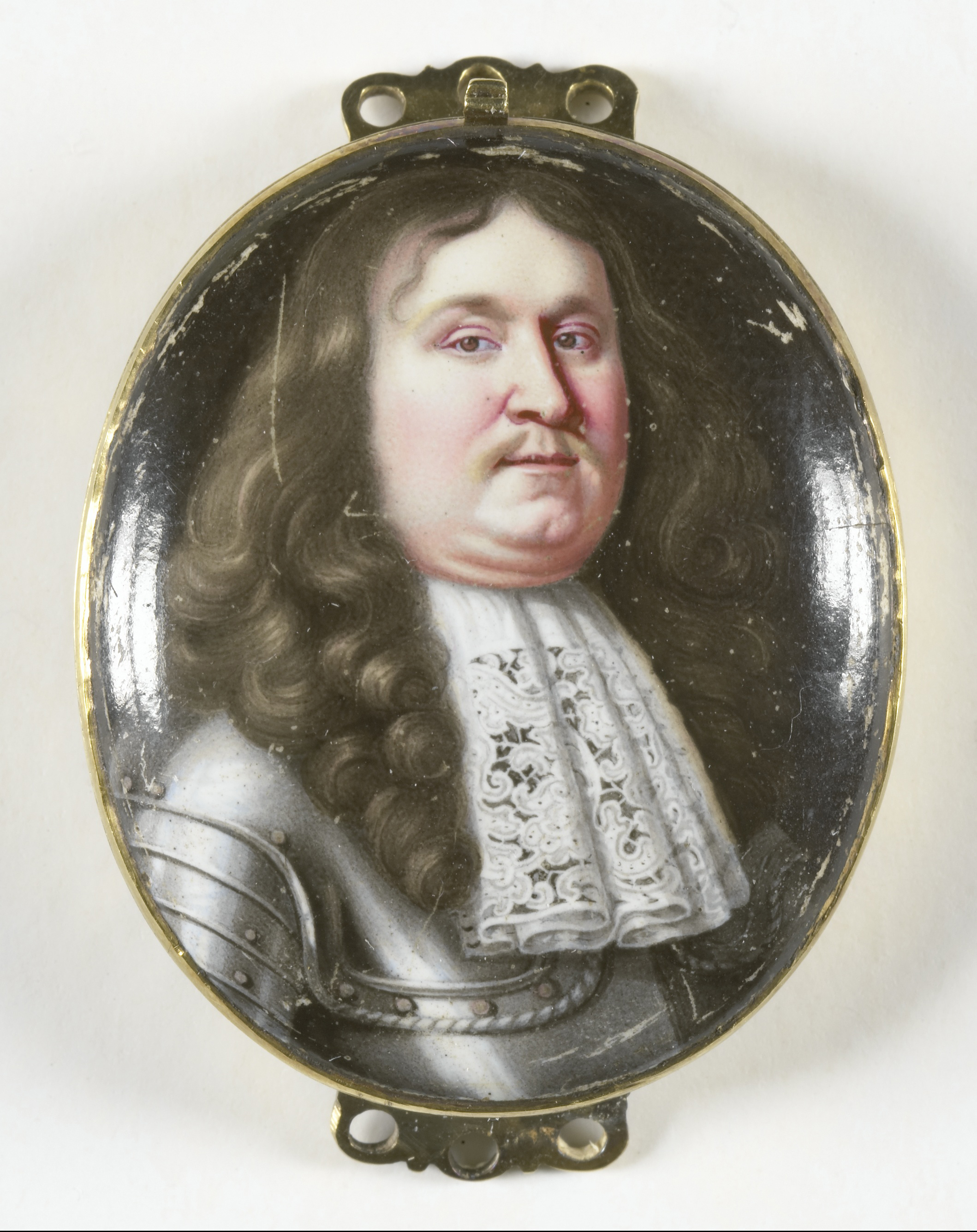 Portret van Adolf prins van Nassau-Schaumburg (1629-76). Buste, naar rechts, aanziend. Onderdeel van de collectie portretminiaturen.